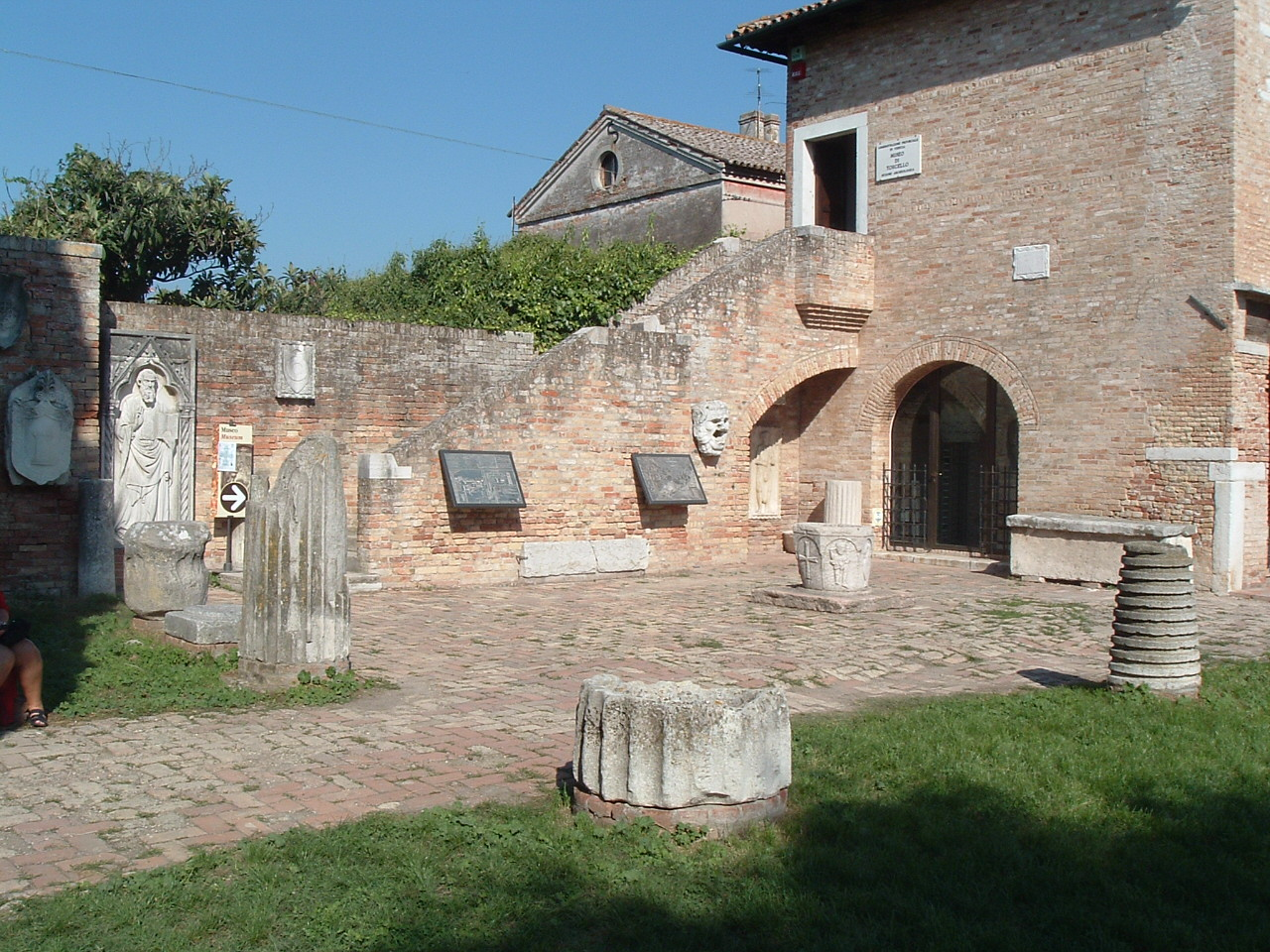 Torcello, helytörténeti múzeum